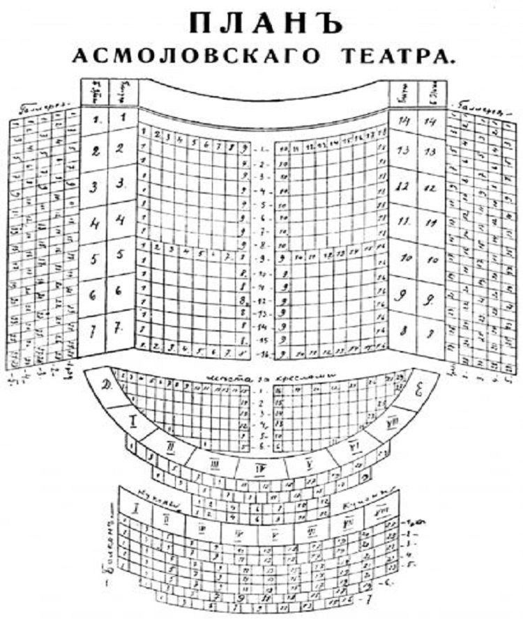 Ростов-на-Дону до Октябрьской революции. План Асмоловского театра.